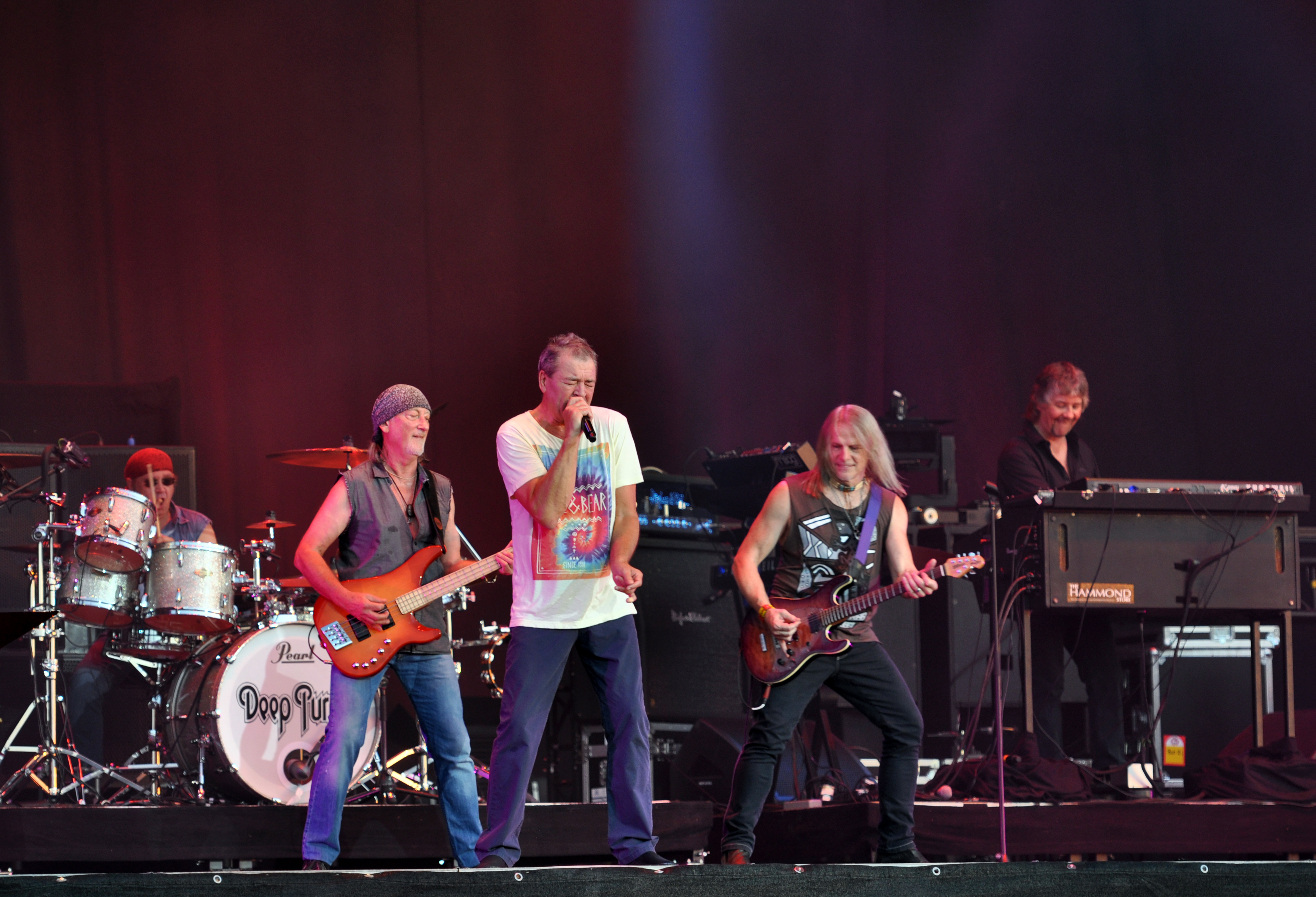 Deep Purple at Wacken Open Air 2013